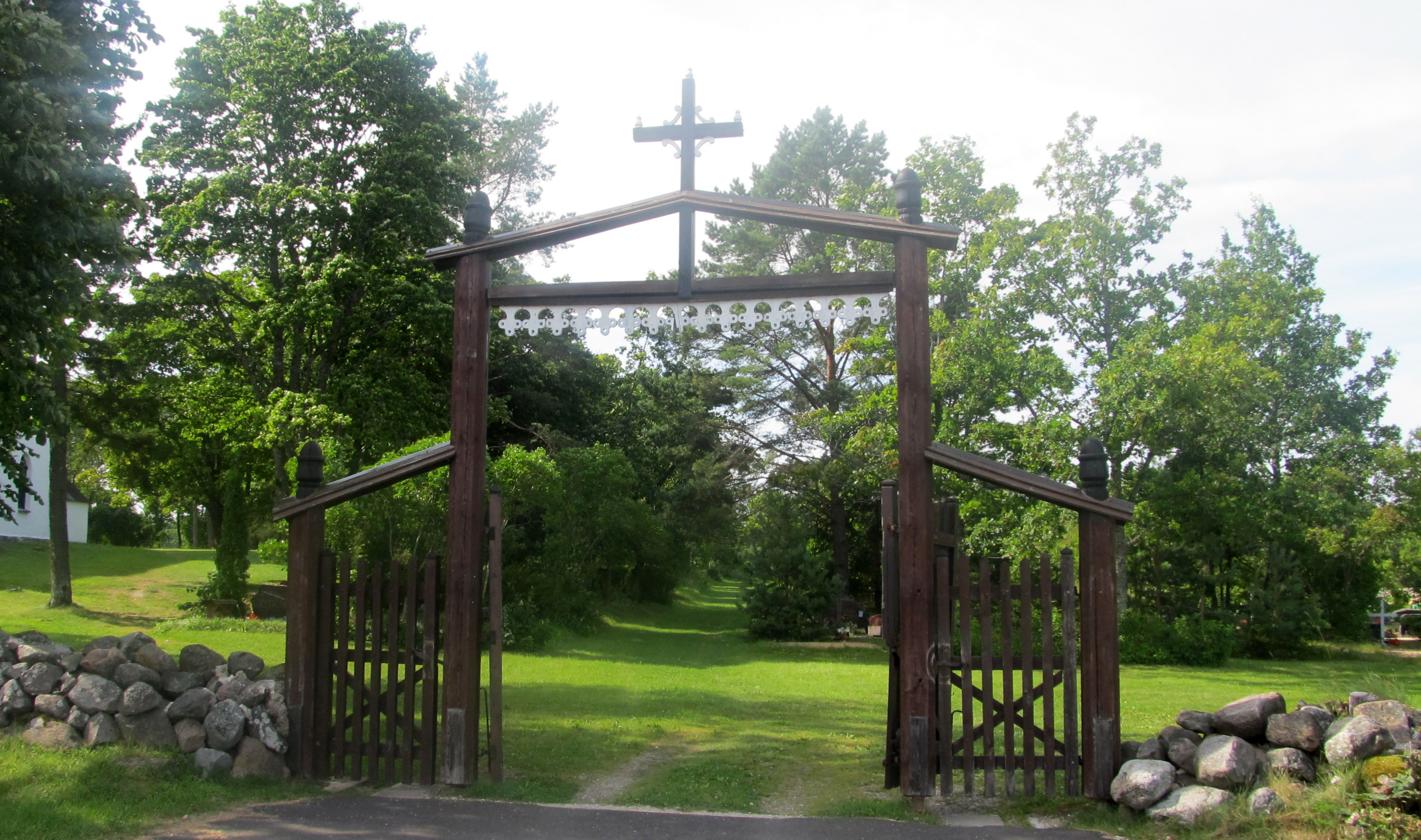 Reigi kirikuaed